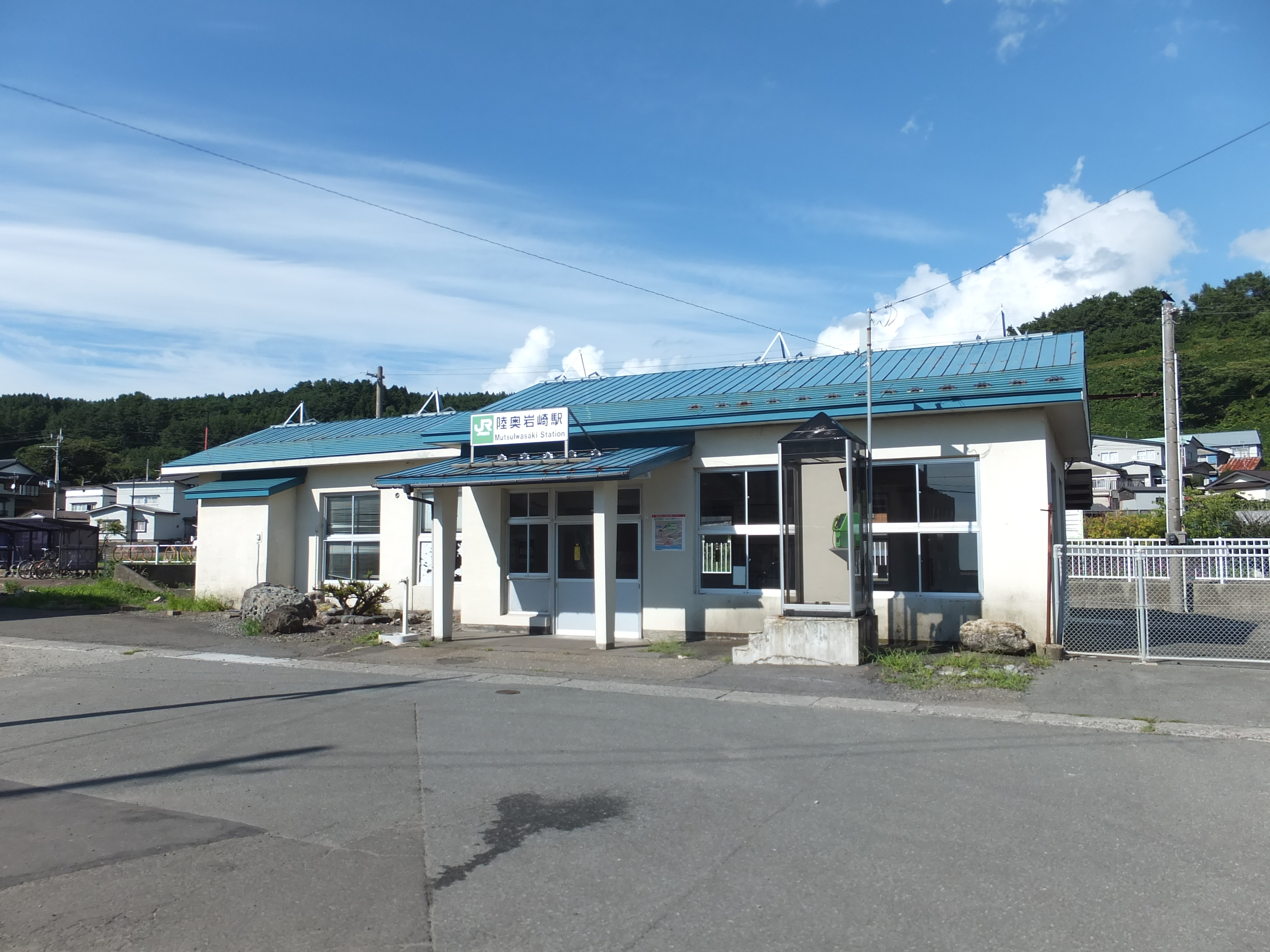 五能線 陸奥岩崎駅（青森県西津軽郡深浦町）